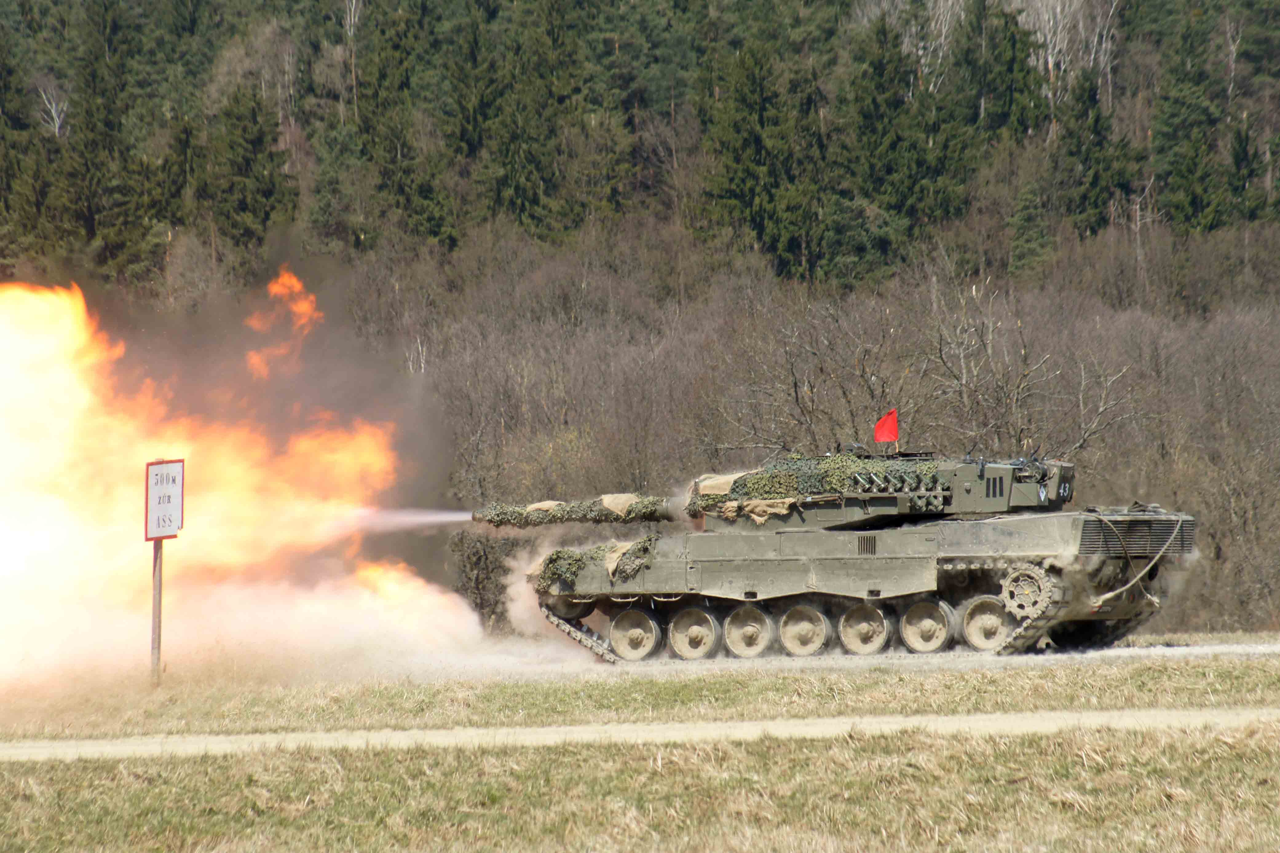 Ein Kampfpanzer "Leopard" 2A4 feuert am Truppenübungsplatz Allentsteig.